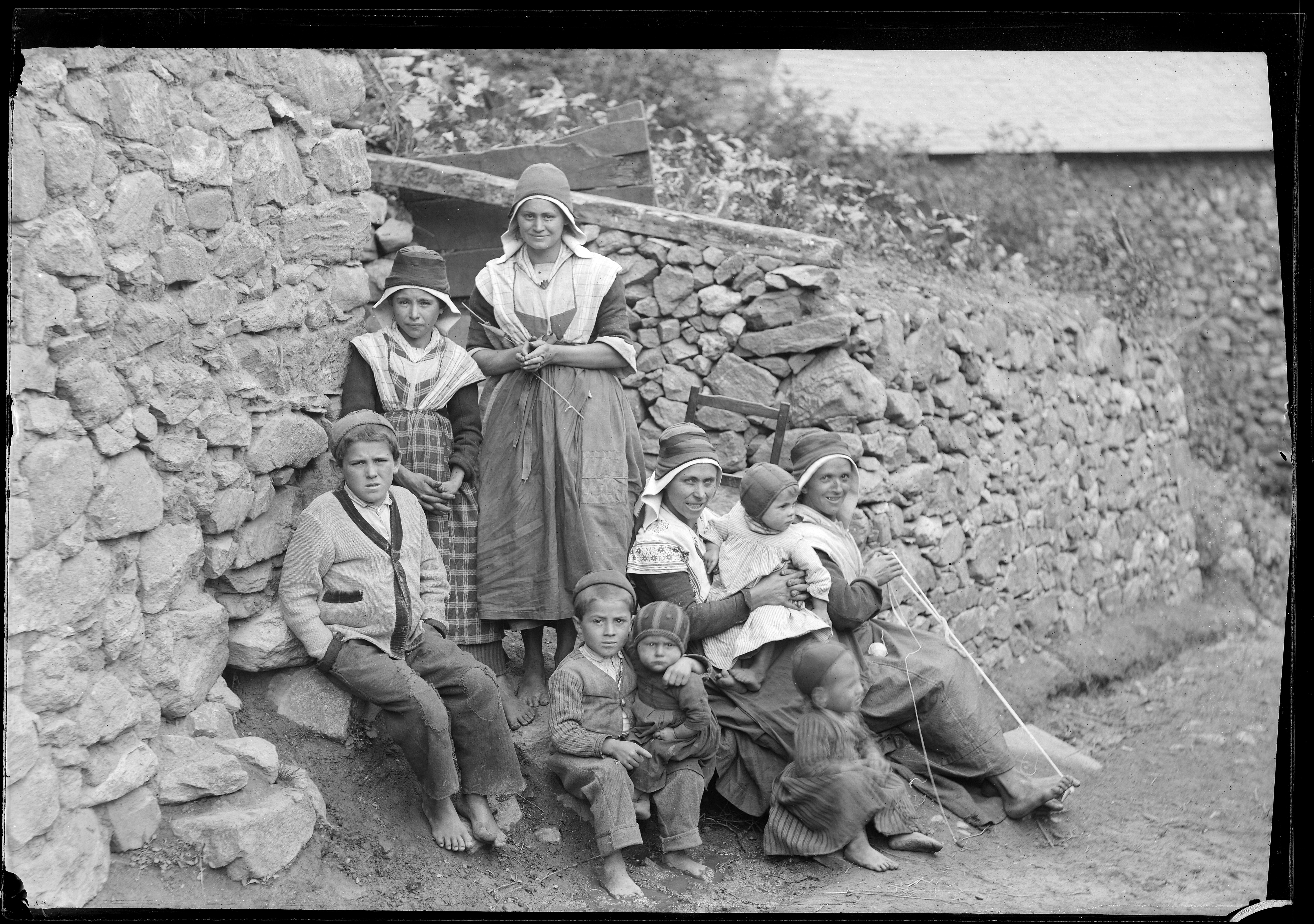 plaque négative au gélatino bromure d'argent, format 15x21 cm. Inscription manuscrite par Eugène Trutat (1840-1910) sur l'enveloppe : " Ariège : vallée de Bethmale -groupes la fileuse au pied " images identiques : 138_B07_13 1521_05_213 1521_A_005 1521_A_006